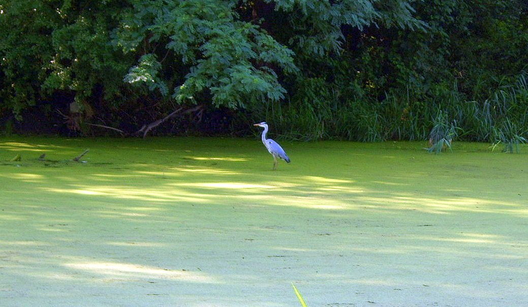 Rzadki widok w parku.